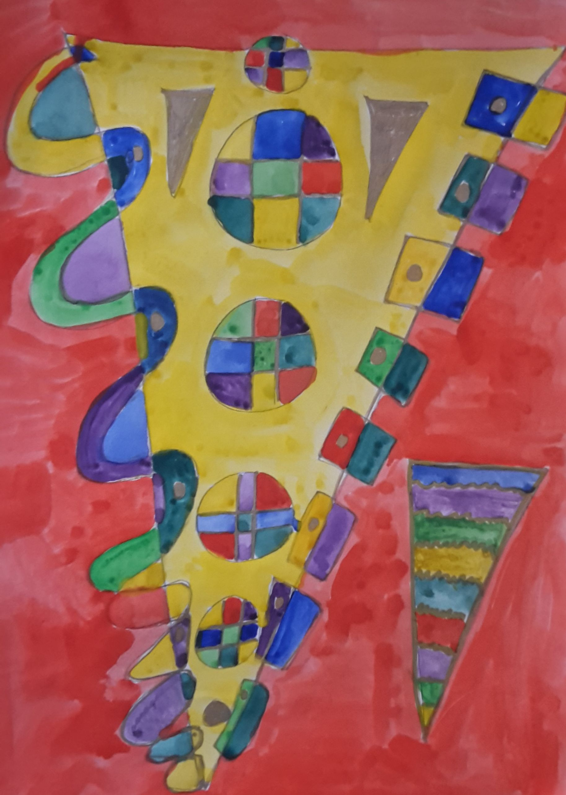 Original Arbeit